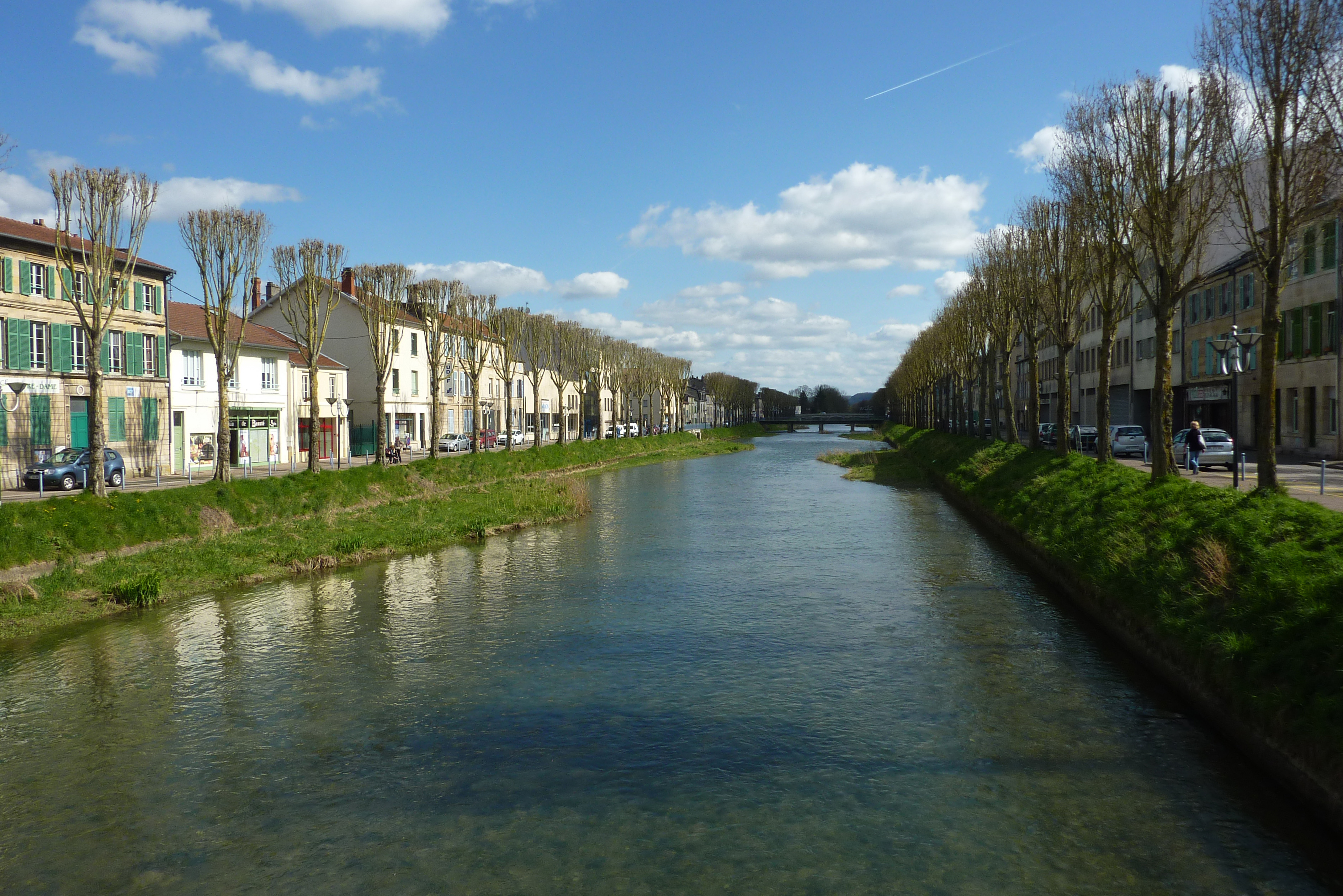 L'Ornain à Bar-le-Duc.